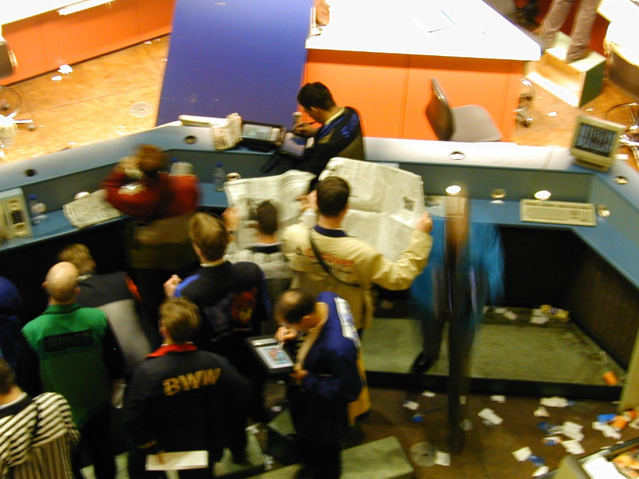 Market makers on Amsterdam Stock Exchange